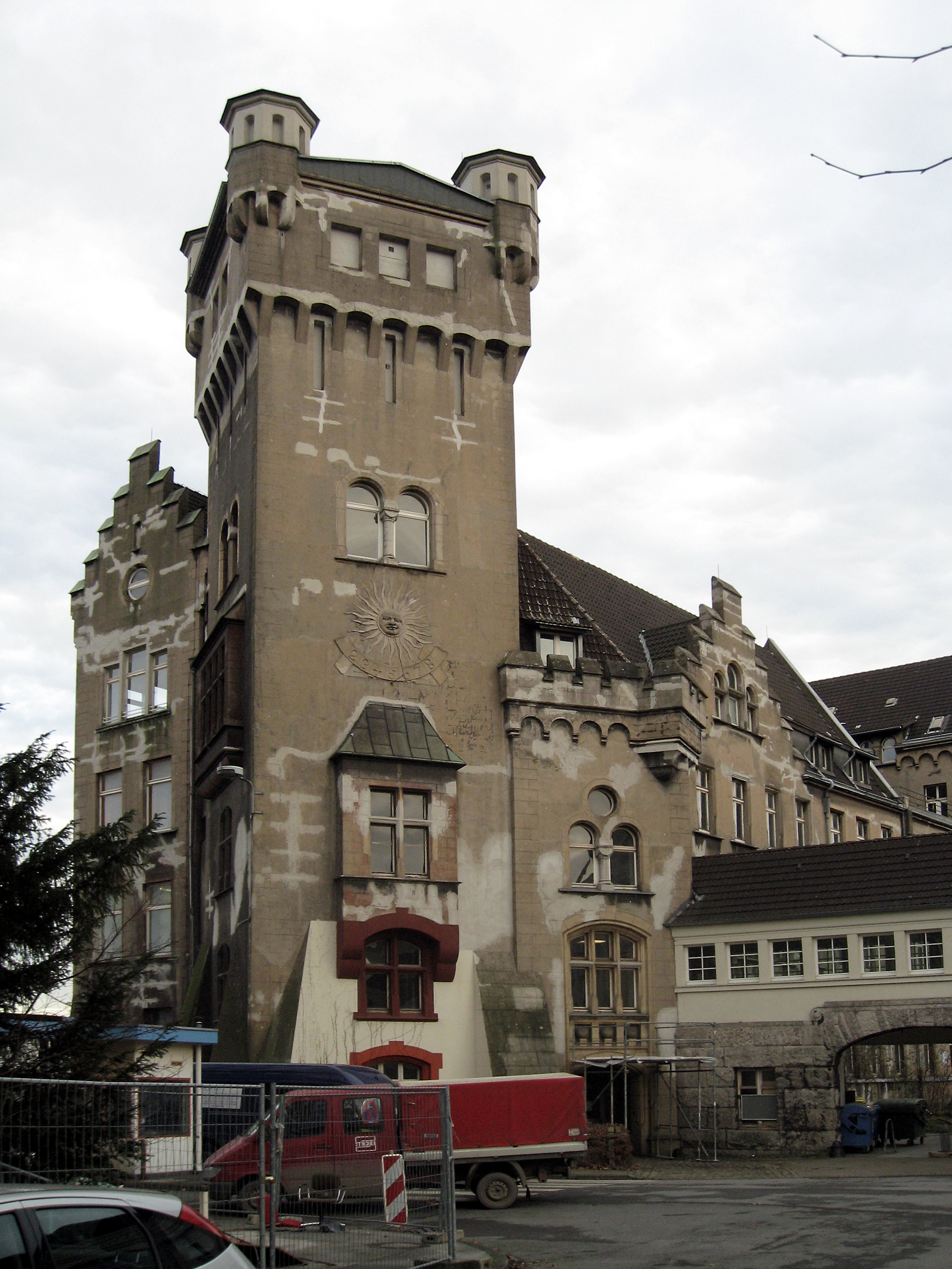 Dortmund-Hörde, Hörder Burg frühere Wasserburg, entstanden um 1287 aus den Steinen der zerstörten Hohensyburg 1840 vom Iserlohner Fabrikanten Hermann Dietrich Piepenstock erworben, der dort das nach ihm benannte Puddel- und Walzwerk "Hermannshütte" einrichtete (Herstellung von Eisenbahnschienen) 1852 erste Aktiengesellschaft im Hüttenwesen des Ruhrgebiets "Hörder Bergwerks- und Hüttenverein" 1906-22 Hauptsitz des Montankonzerns Phoenix